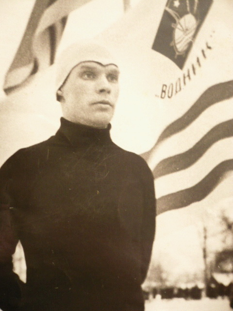 Чемпион СССР по конькобежному спорту Г.П.Пискунов